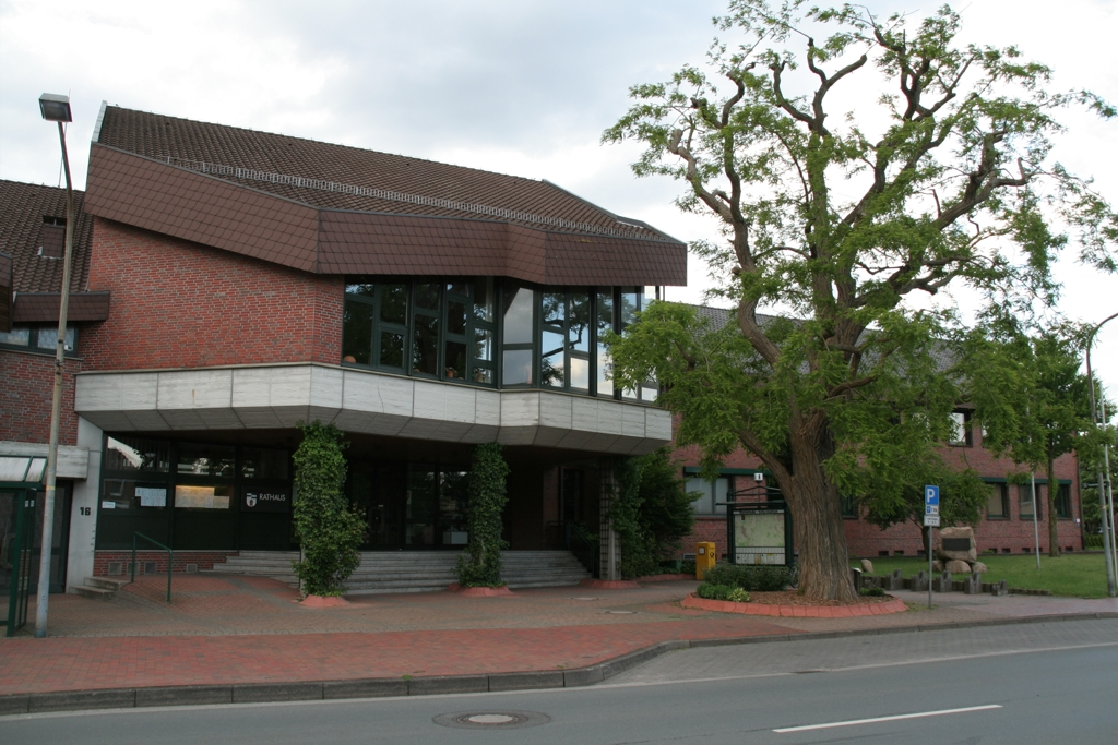 townhall of Wardenburg, Niedersachsen, Germany